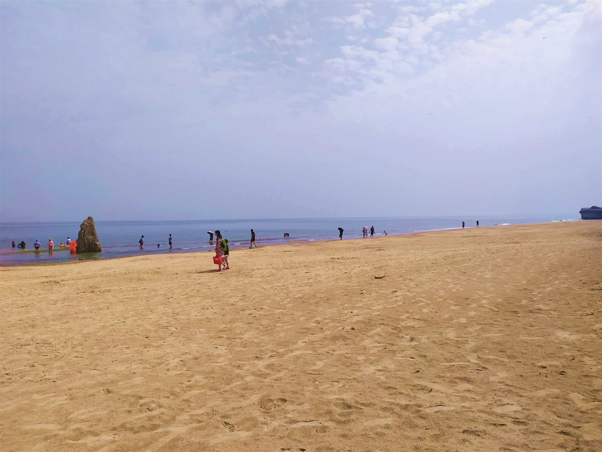 中文（中国大陆）: 天马栈桥和附近的金沙滩